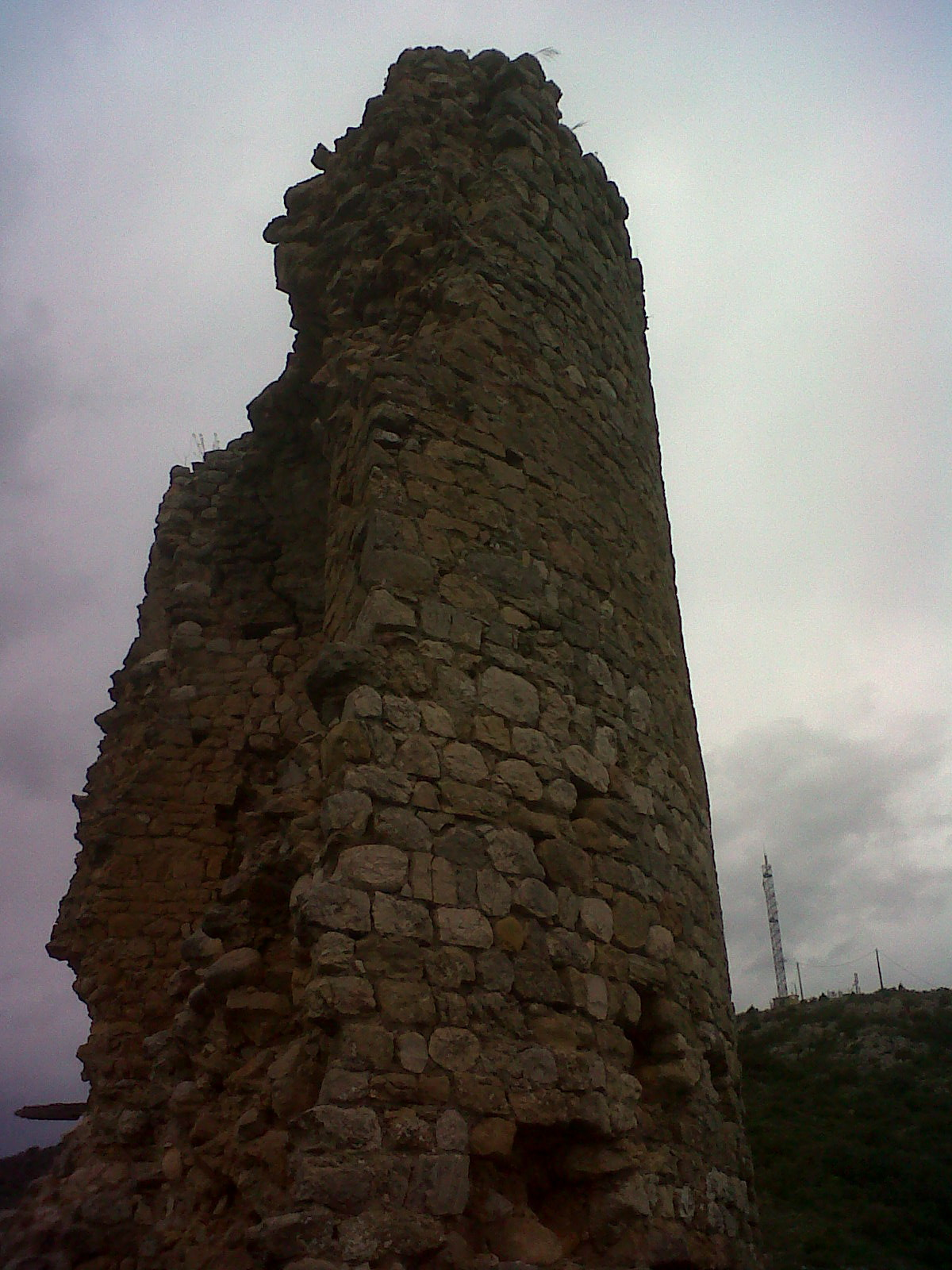 Torre de homenage del castillo de Alòs de Balaguer